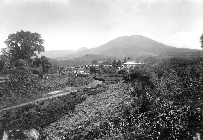 Negatief. Thee-onderneming Goalpara, Preanger